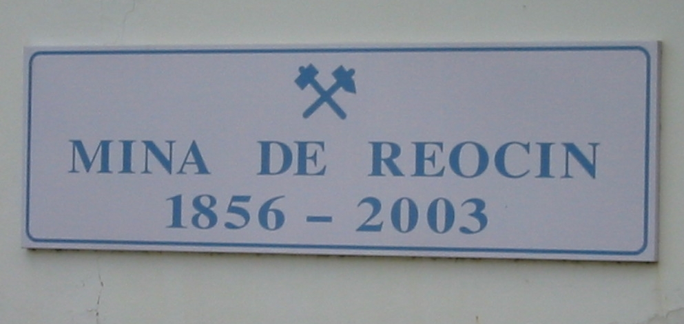 Cartel con las fechas de explotación de la mina de Reocín, Cantabria, España